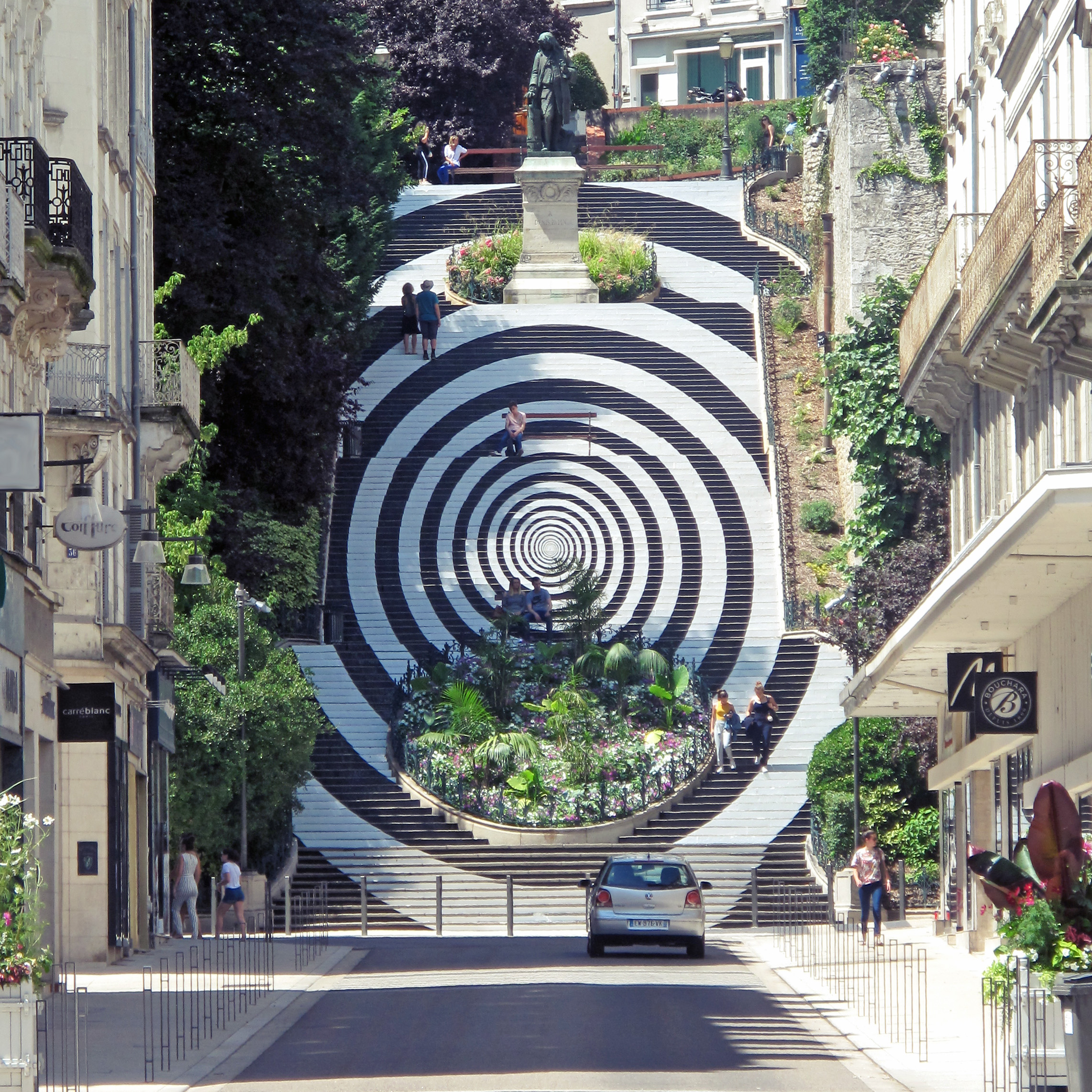 À l’occasion des vingt ans de la Maison de la magie à Blois, l’escalier Denis-Papin a été entièrement recouvert par une spirale en noir et blanc ; clin d’œil au thème de l’illusion, au cœur du vingtième anniversaire.